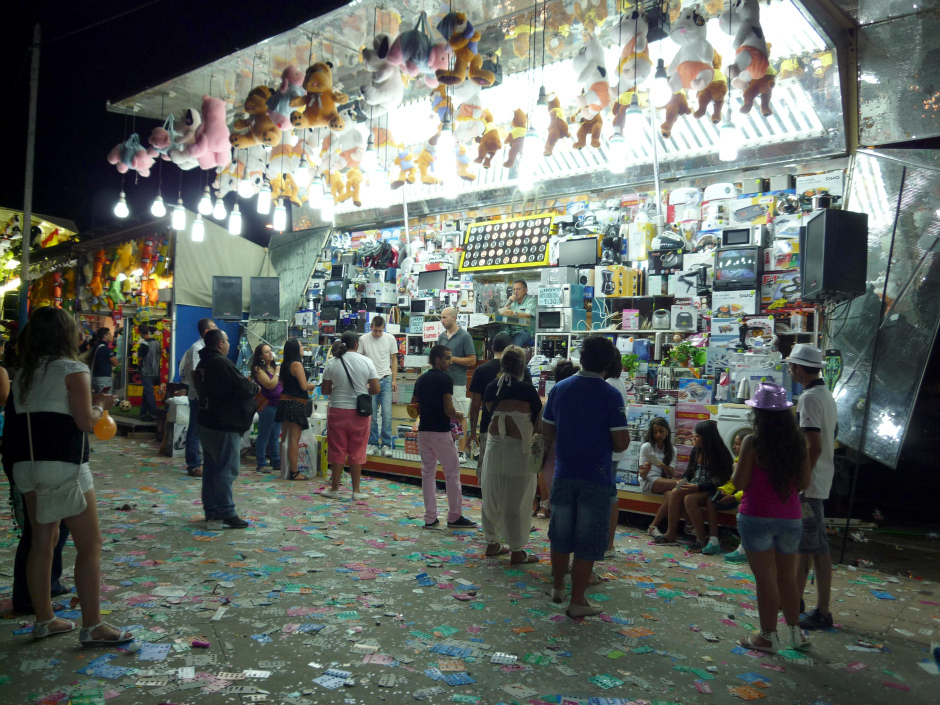 Tómbola.